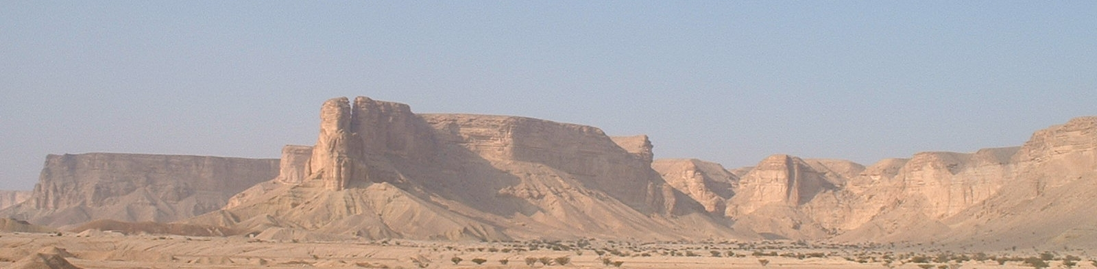 Al-Yamama, Saudi Arabia.